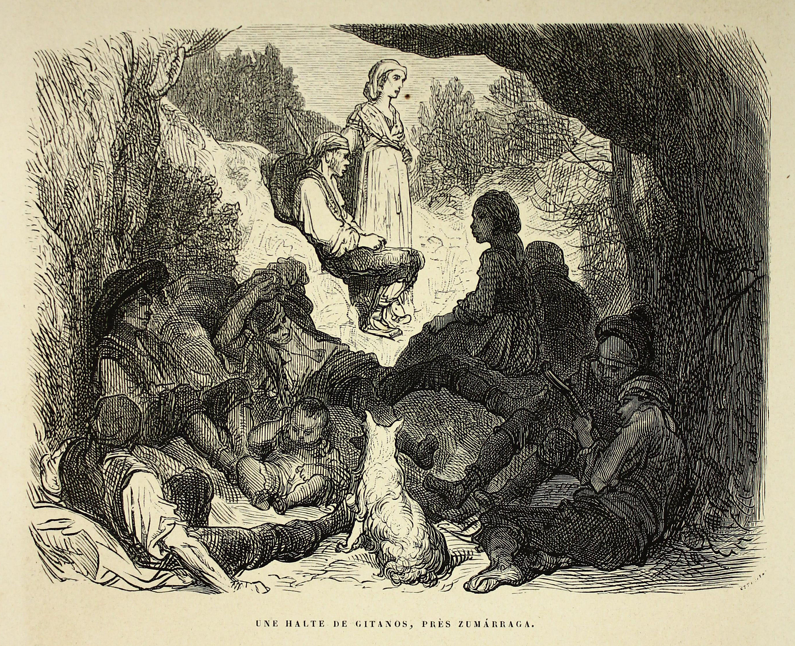 Autor: Davillier, Jean Charles, barón, 1823-1883 Descripción bibliográfica: L'Espagne / par Le Baron CH. Davillier ; ilustrée de 309 gravures dessinées su bois par Gustave Doré. - Paris : Librairie Hachette, 1874. - 799 p. : il. Materia: España- Geografía Materia: España- Usos y costumbres Ilustrador: Doré, Gustave, 1832-1883 Editor: Libreria Hachette Lugar de impresión: Francia, París Localización: Libro completo